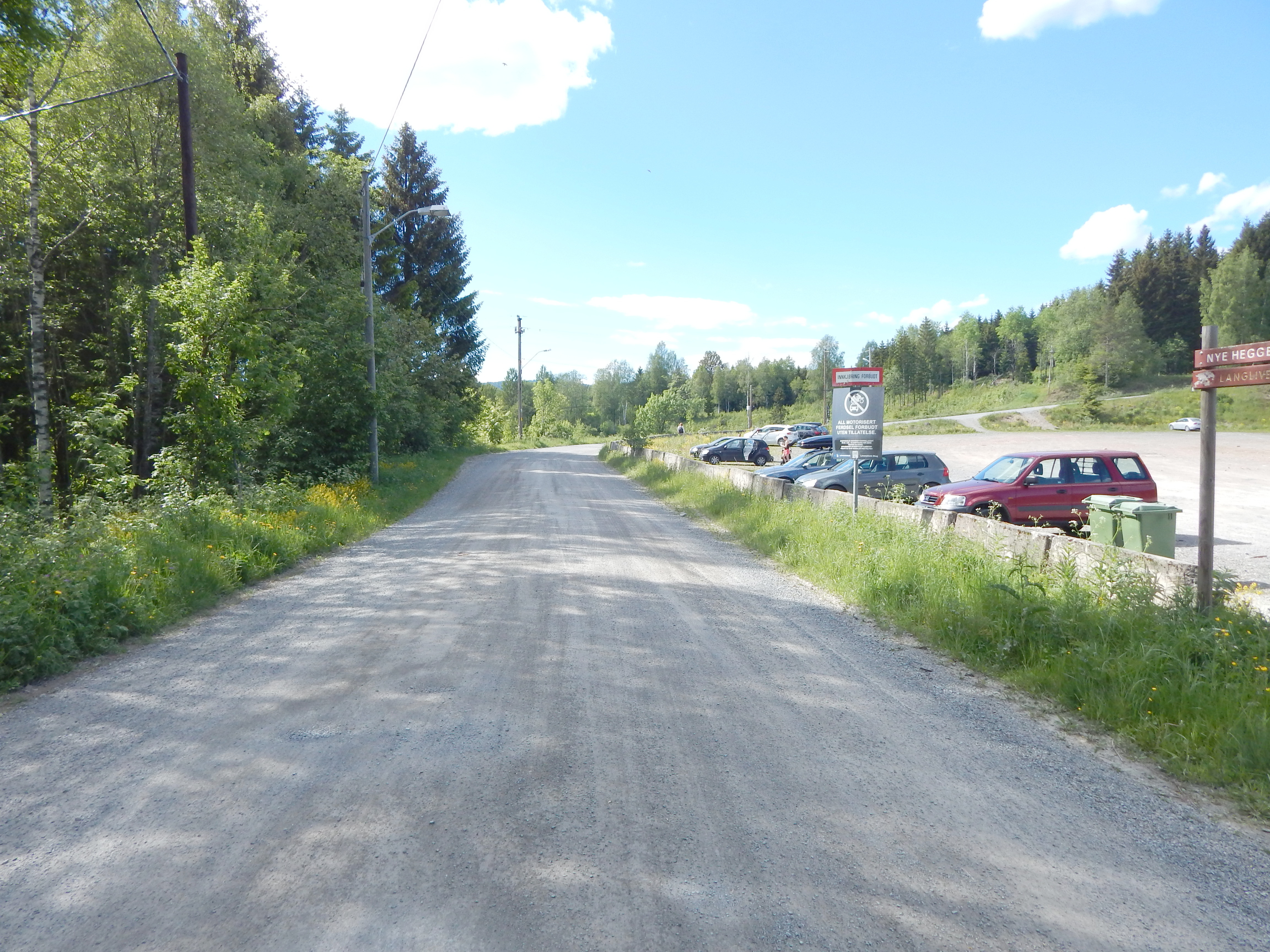 Langliveien